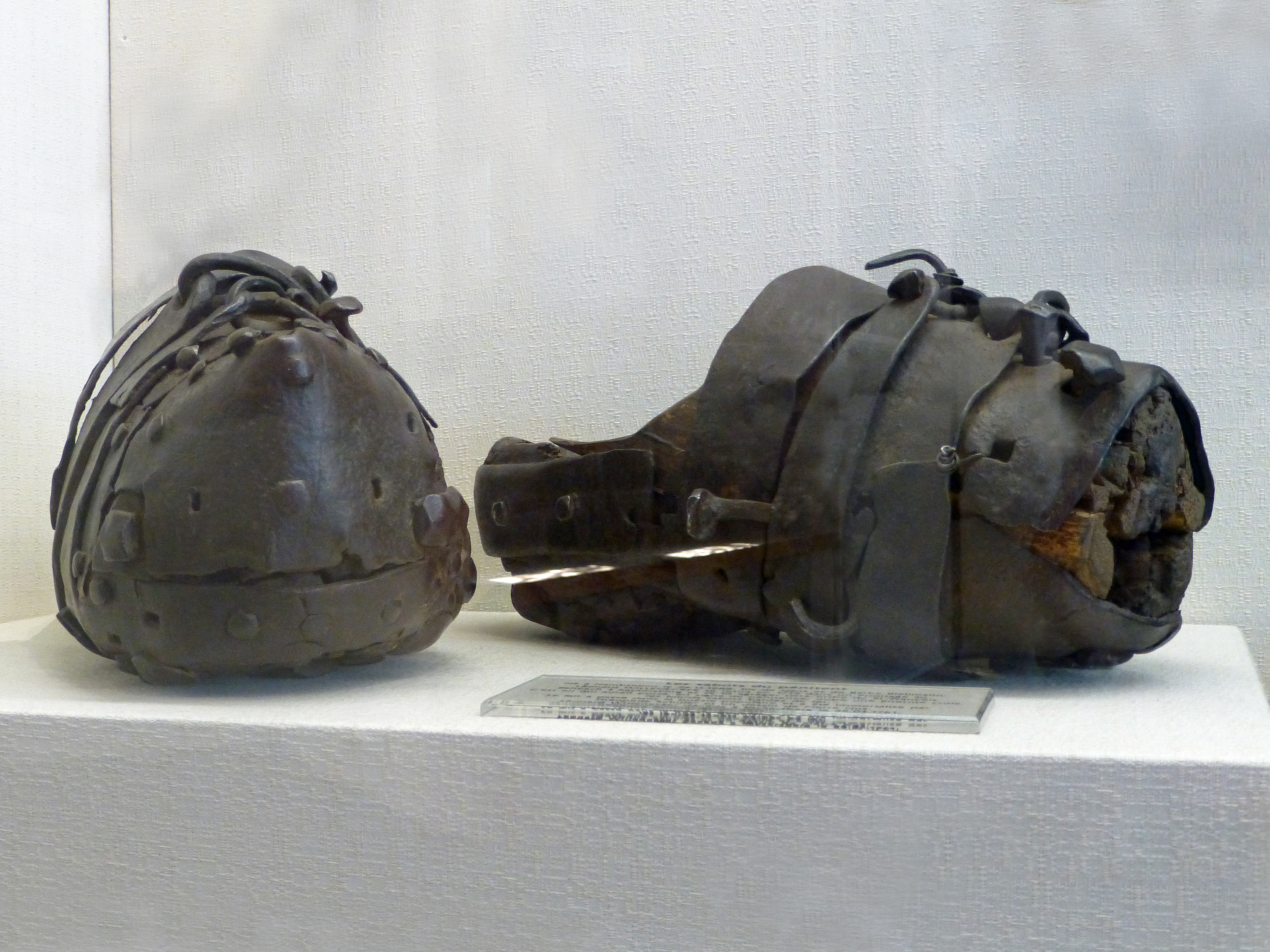 Sabots du pénitent de Kaysersberg. Il s'agirait de Léonard Willenecker, né à Nambsheim le 24 novembre 1688 et mort à Kaysersberg le 24 avril 1761. Il se retira en 1719 dans un ermitage au Rehbach à Kaysersberg et aurait porté, en signe de pénitence, outre une croix de fer, ces lourds sabots bardés de fer (10,7 kg) . Cette légende (?) a été immortalisée par Théophile Schuler et un dessin de Pierre Nus. Musée historique de Kaysersberg (Haut-Rhin).